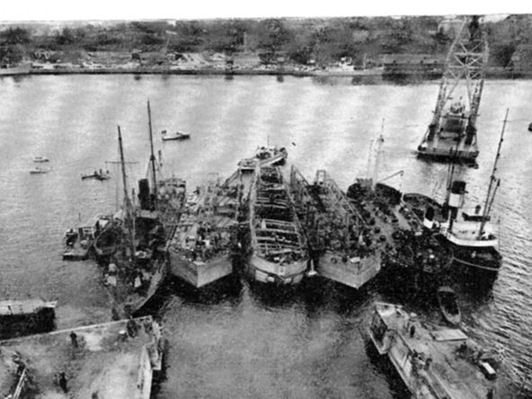 Vasa salvage fleet in 1961